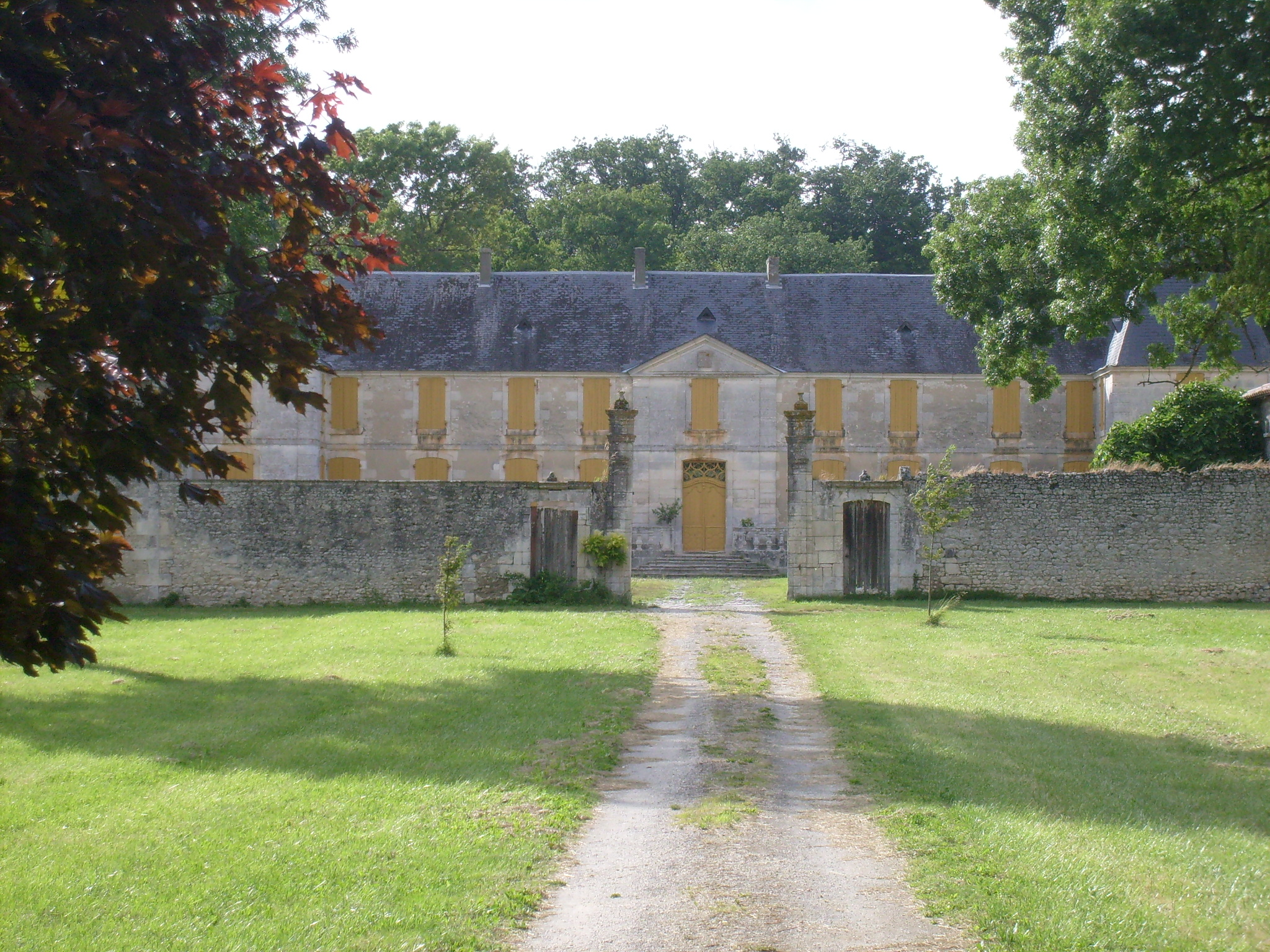 Château de la Rigaudière à Médis (Charente-Maritime)